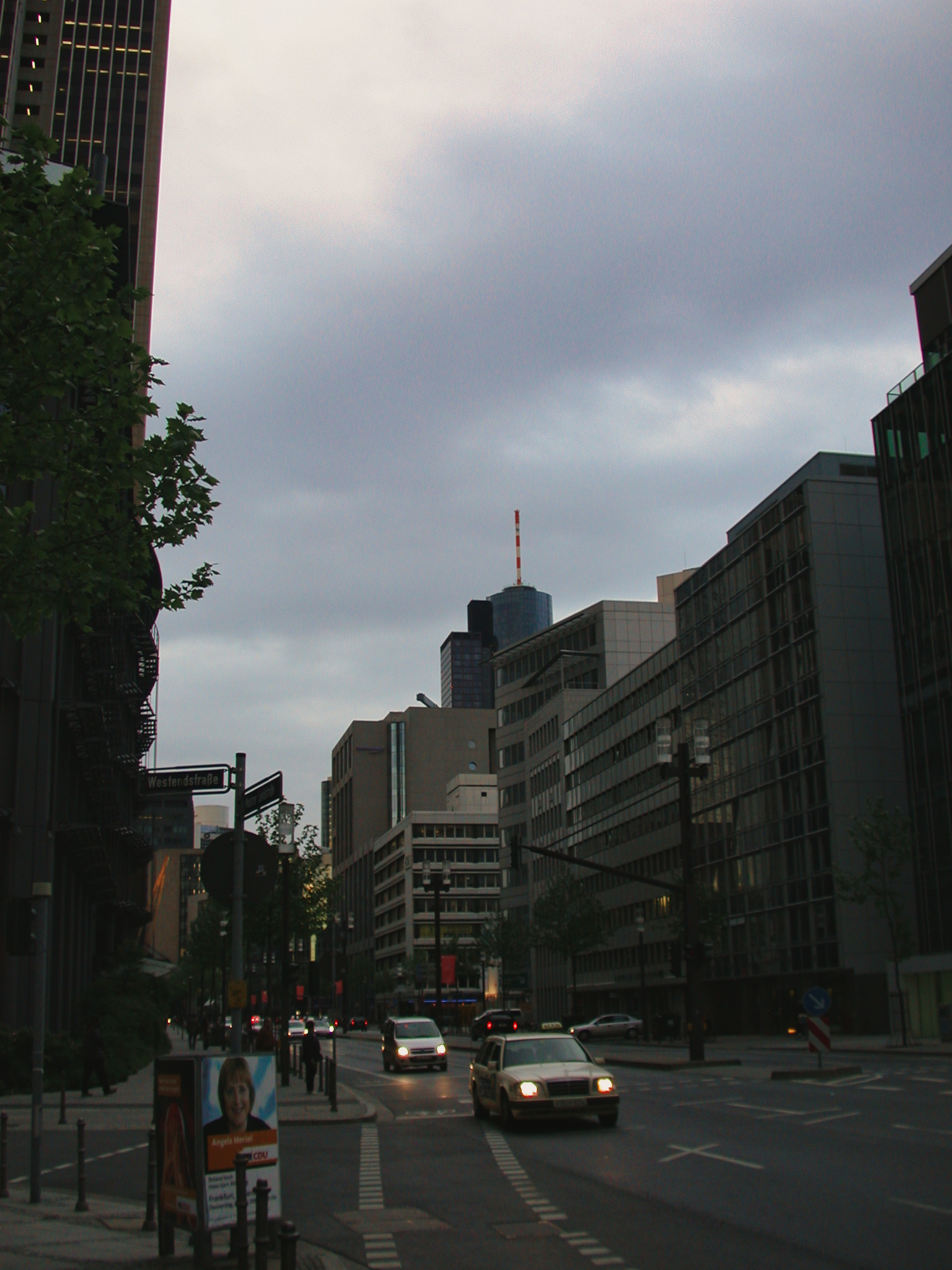 Die Mainzer Landstraße in Frankfurt - Selbst fotografiert (first uploaded: 17:31, 22. Jul. 2004)